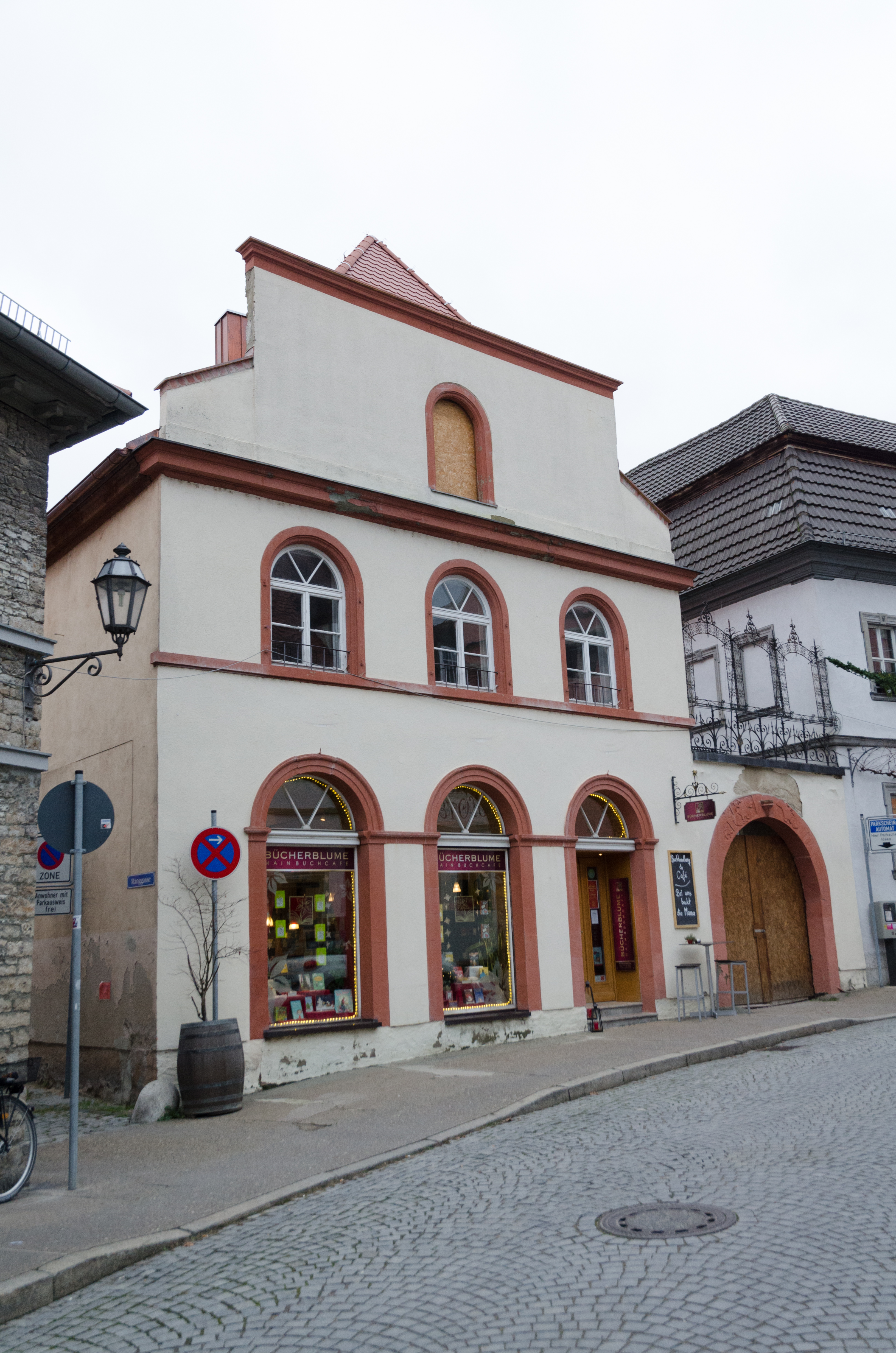 Volkach, Hauptstraße 48